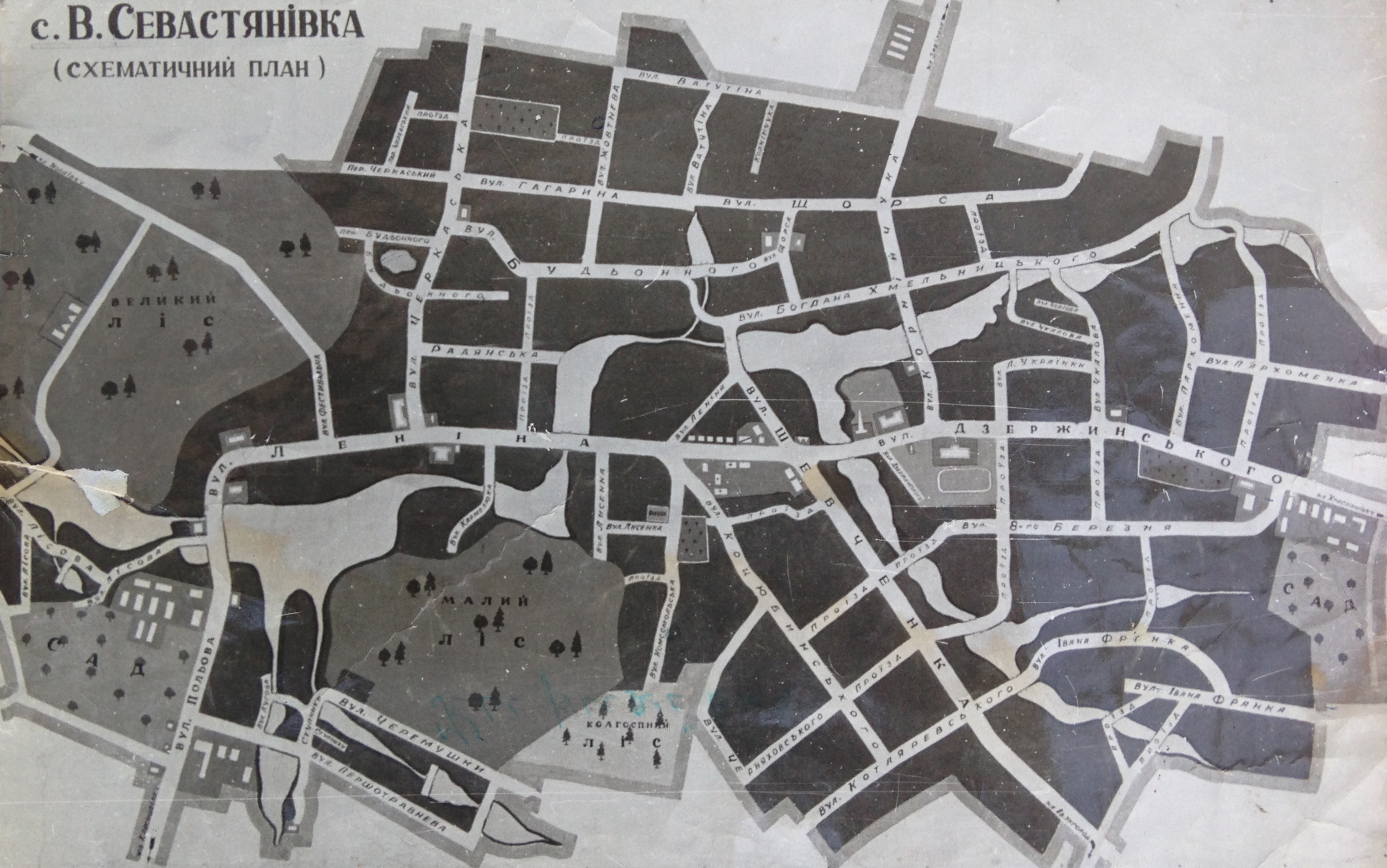 Повоєнна мапа села Велика Севастьянівка